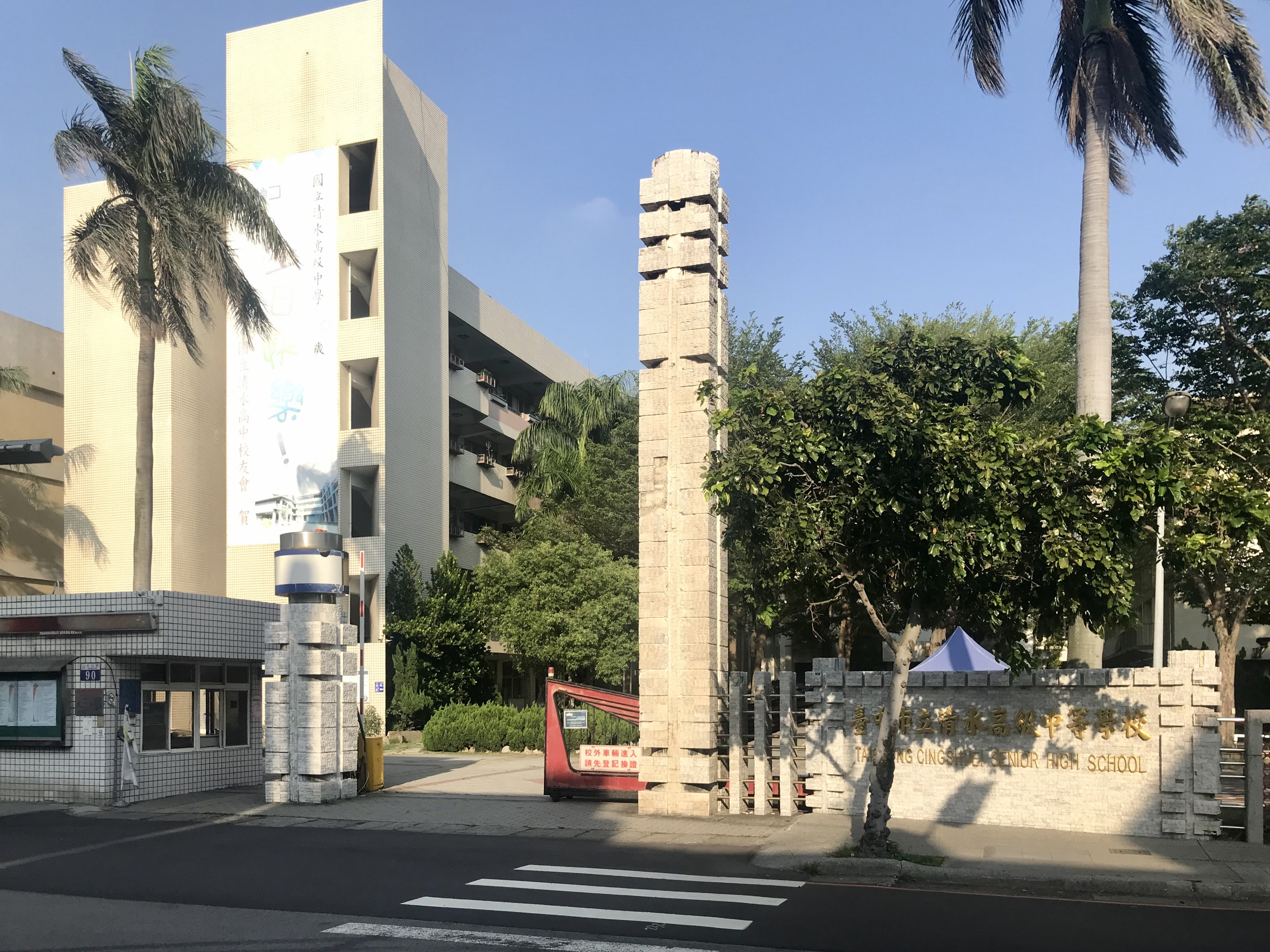 清水高中校門和弘道樓